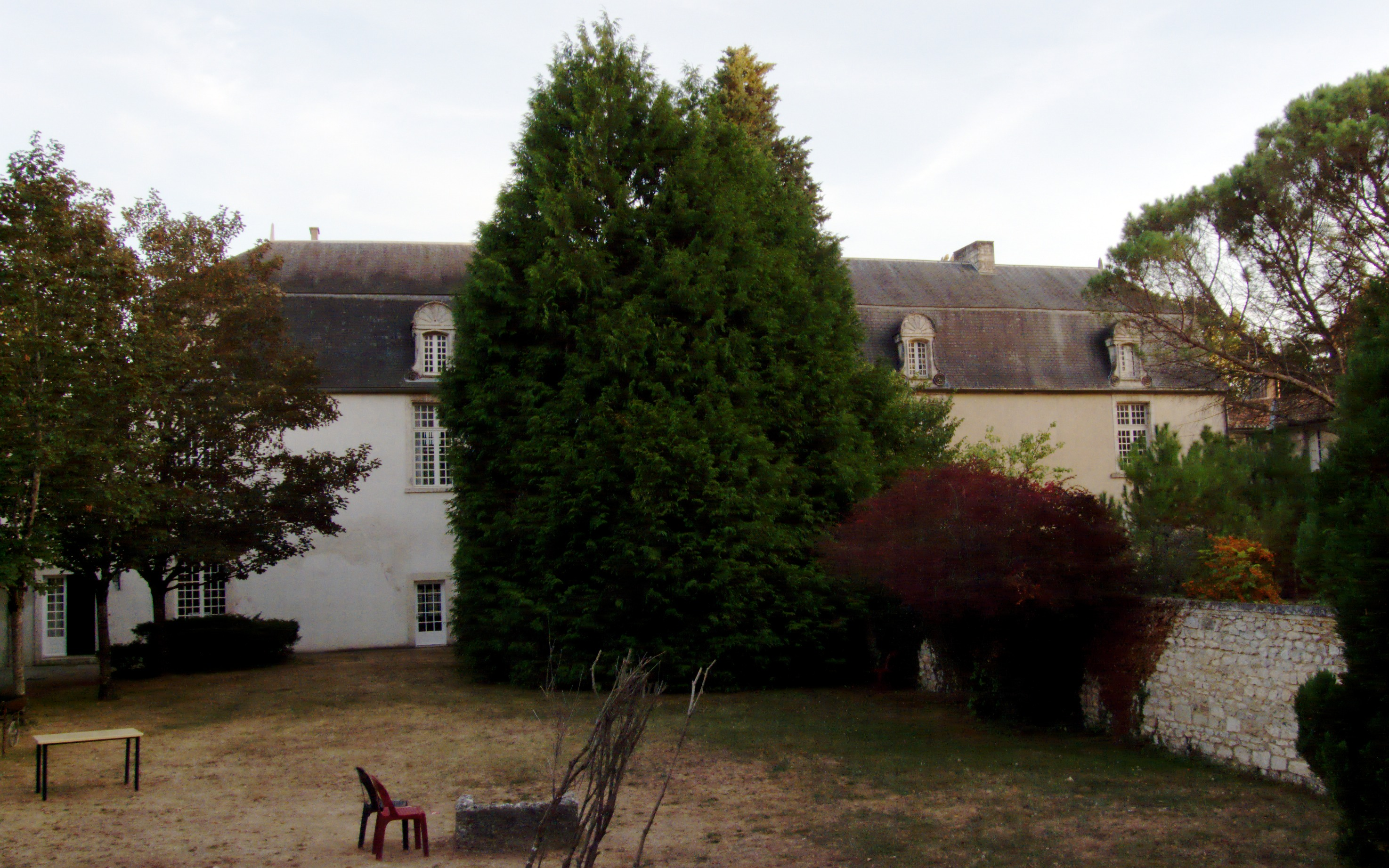 Logis de Fissac, Fissac, commune de Ruelle-sur-Touvre en Charente (Inscrit, 1969) .